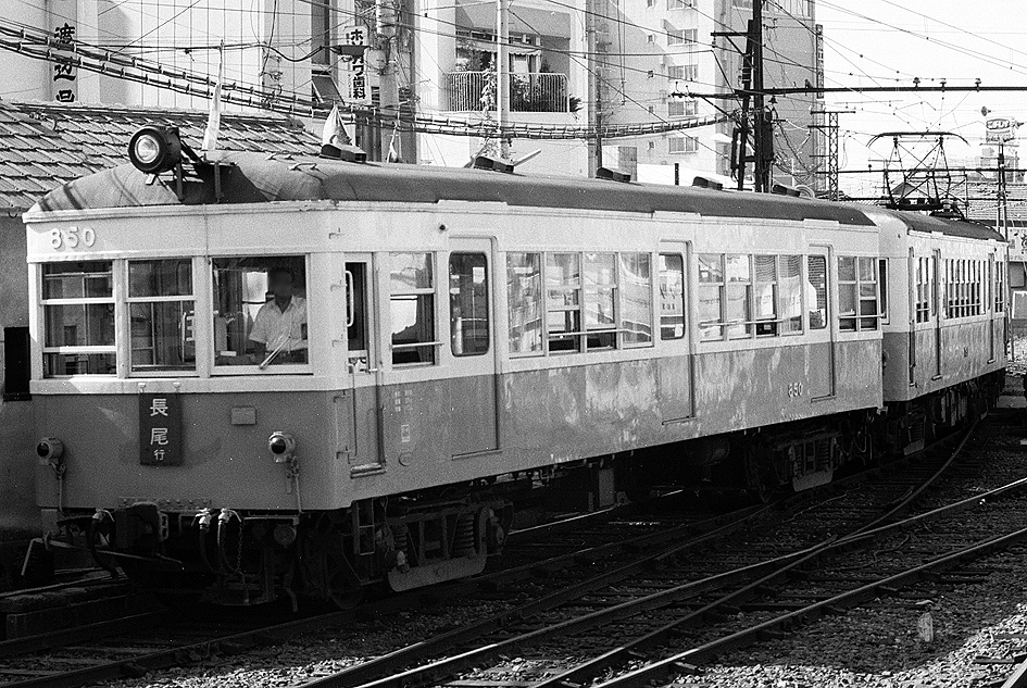 高松琴平電鉄 850+760